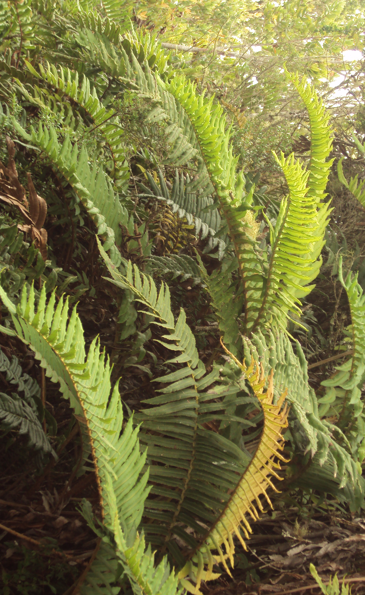 Helecho Costilla de Vaca (Blechnum chilense)